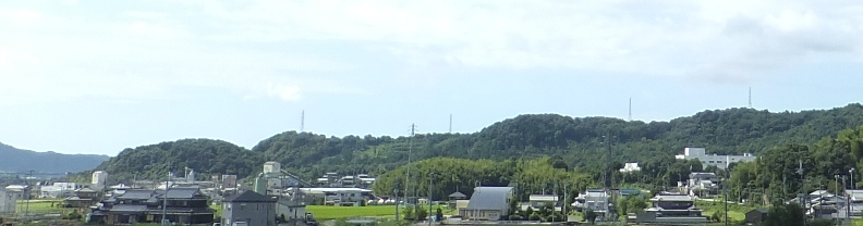 兵庫県神崎郡福崎町西治